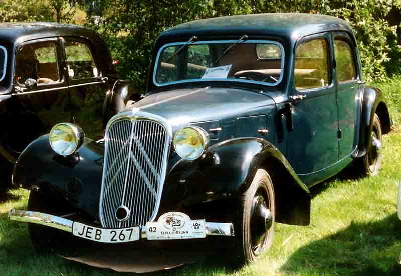 Citroen 7C Berline Legere 1935